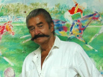 Лерой Ниман (1921—2012), американский художник.